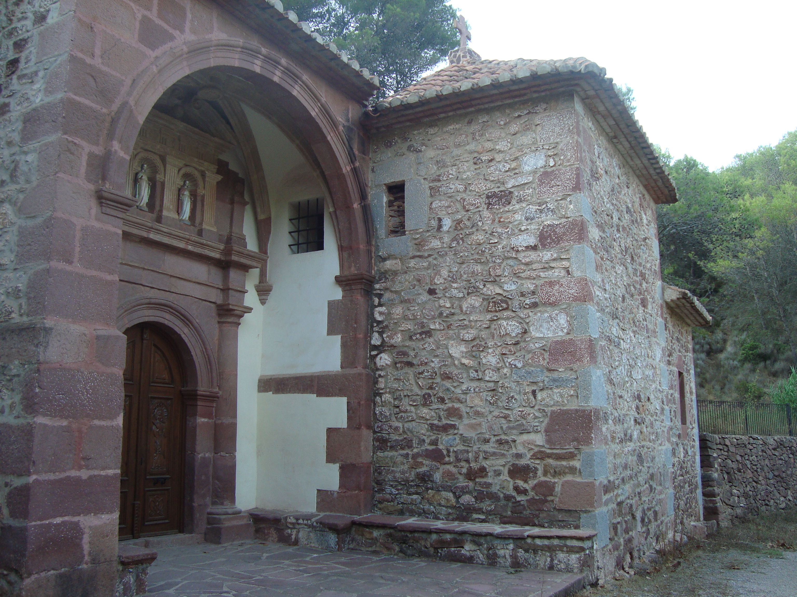 Iglesia del Ermitorio de las Santas Santa Águeda y Santa Lucía, Cabanes